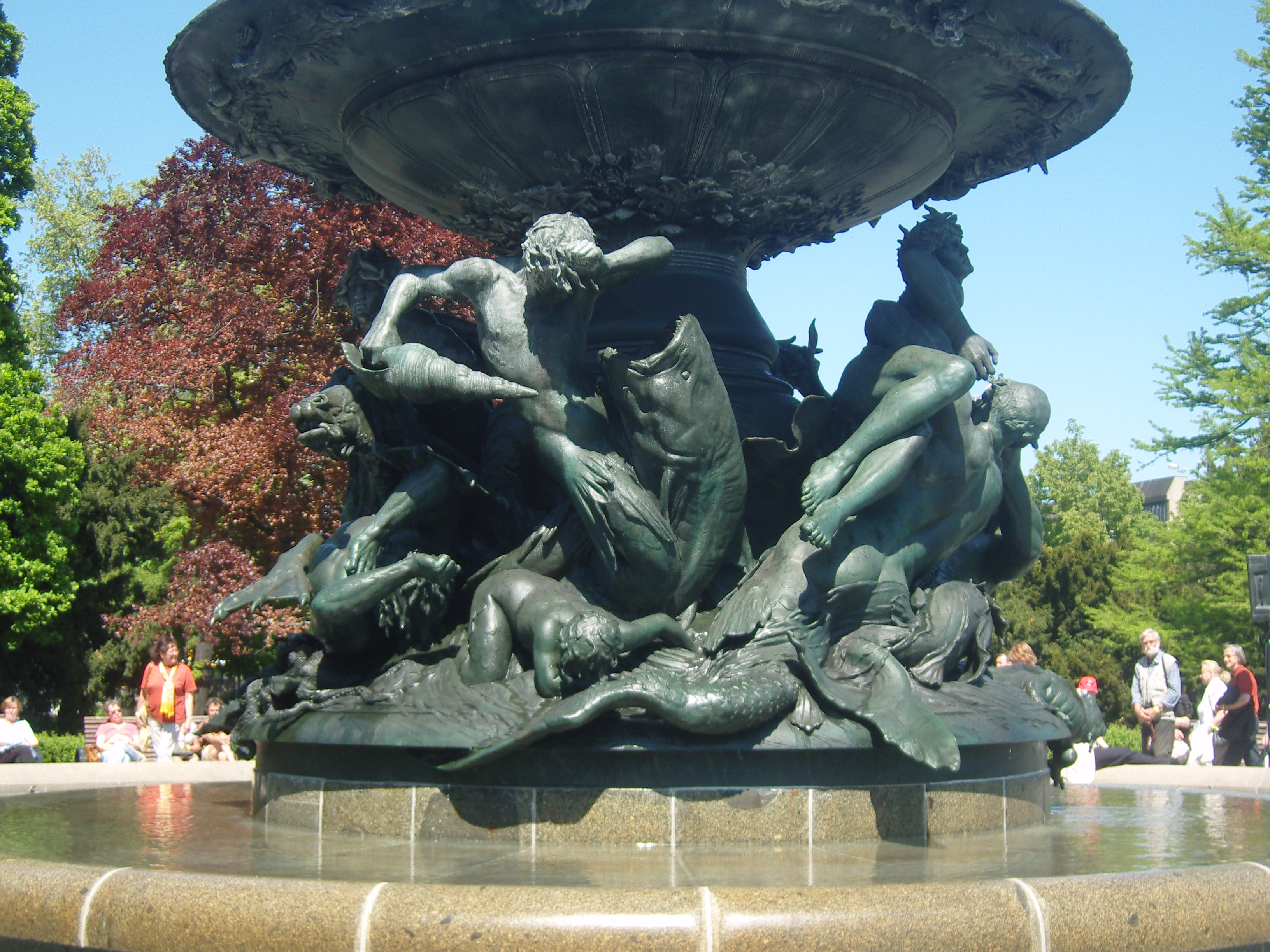 Figuren am Brunnen Stürmische Wogen in Dresden. Der Brunnen wurde unter der Bezeichnung La Tempête in der von der Porte Binet in das Gelände der Pariser Weltausstellung (1900) führenden Allee am Cours-la-Reine gezeigt. (Charles Ponsonailhe: La Sculpture étrangère à la décennale in L'Exposition de Paris, 1900, Paris, Montgrédien Ed., S. 259)